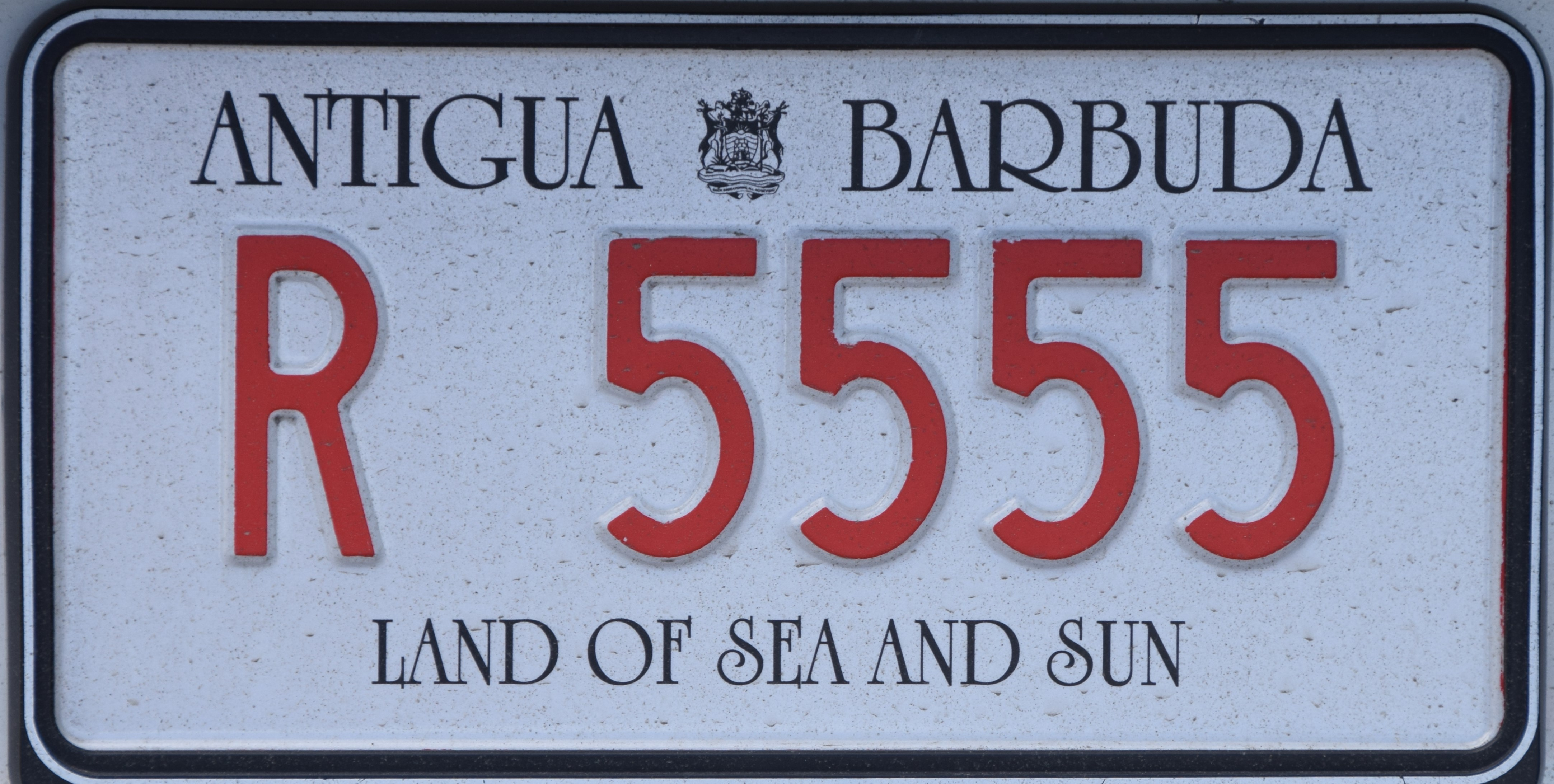 Huur auto kenteken Antigua and Barbuda